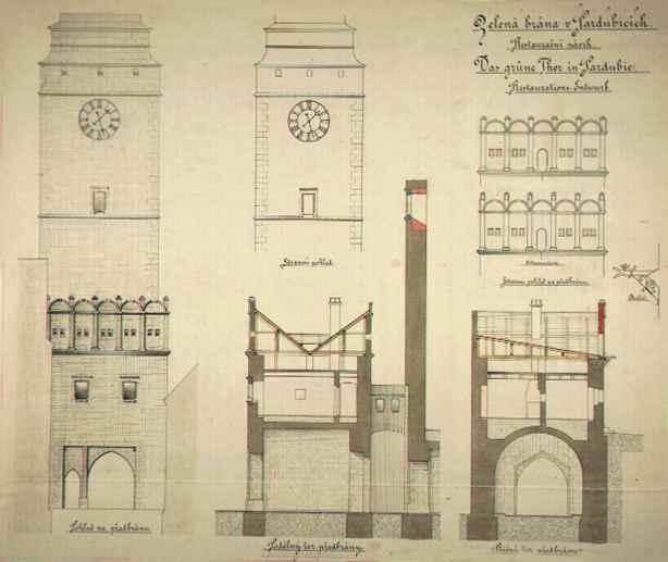 Planzeichnung des Grünen Turms in Pardubice von Josef Mocker aus dem Jahr 1884